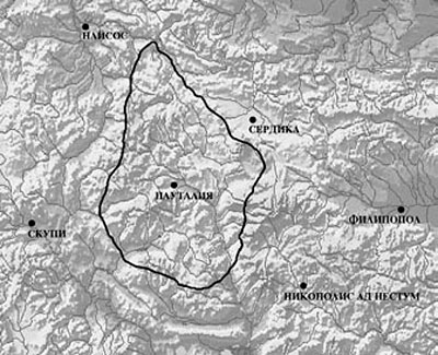 Градска територия на Пауталия ІІІ в.